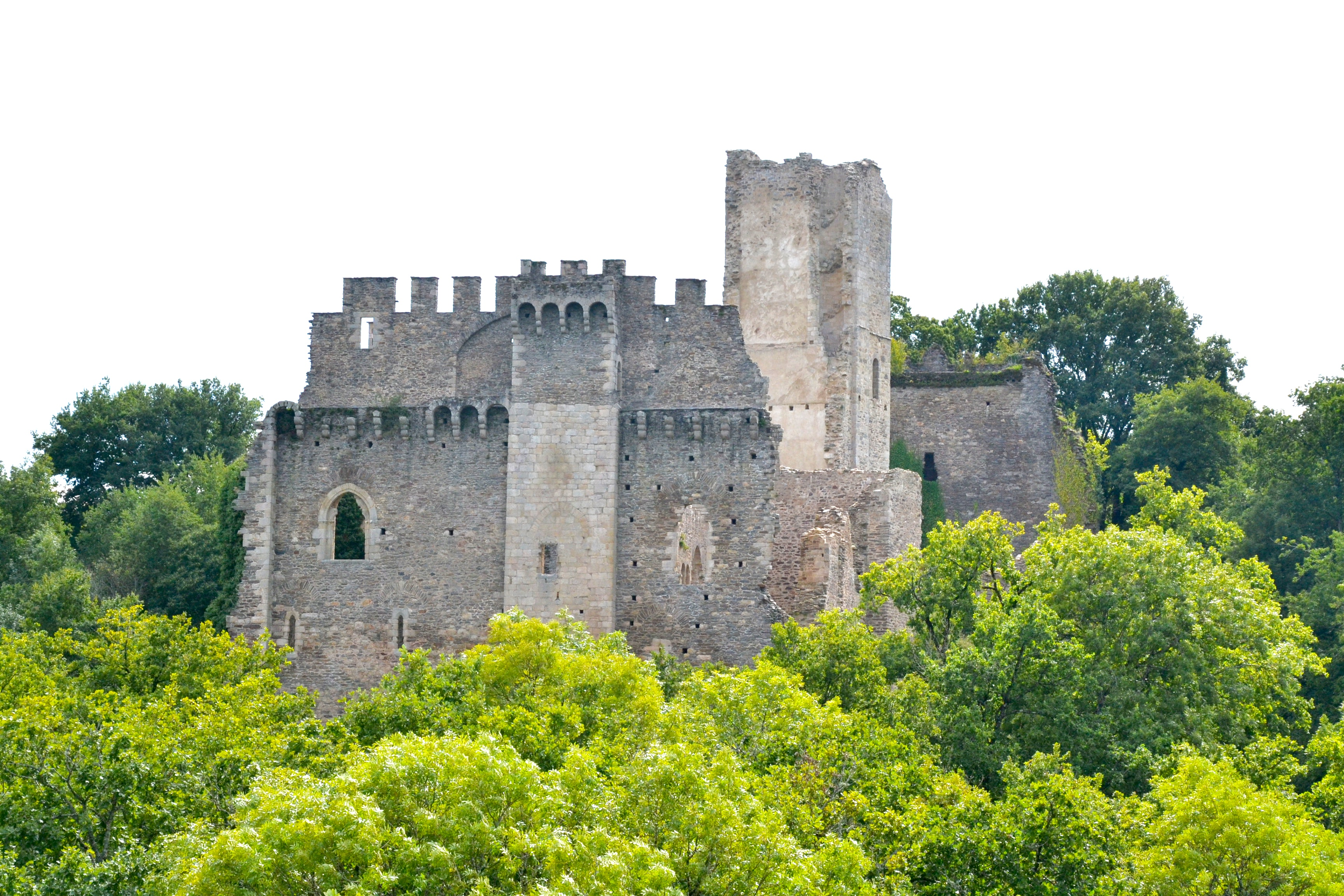 Château de Chalucet .